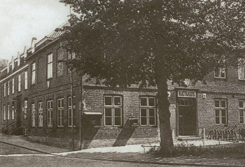 Das alte Uetesener Rathaus Bauj. 1907